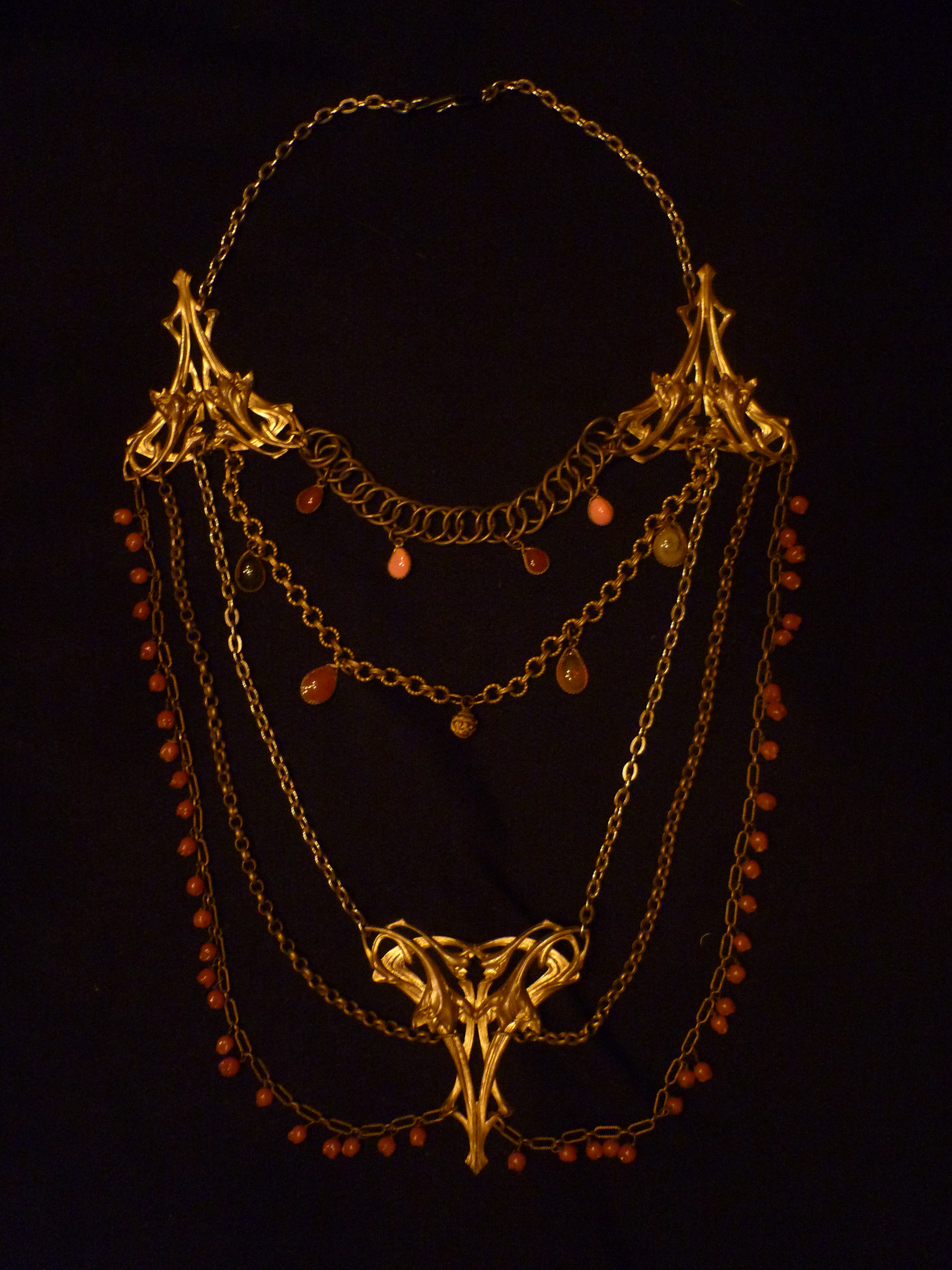 Long collier appelé sautoir, époque art nouveau, vers 1900. Matériaux utilisés pour les ornements : laiton, verre et corail.